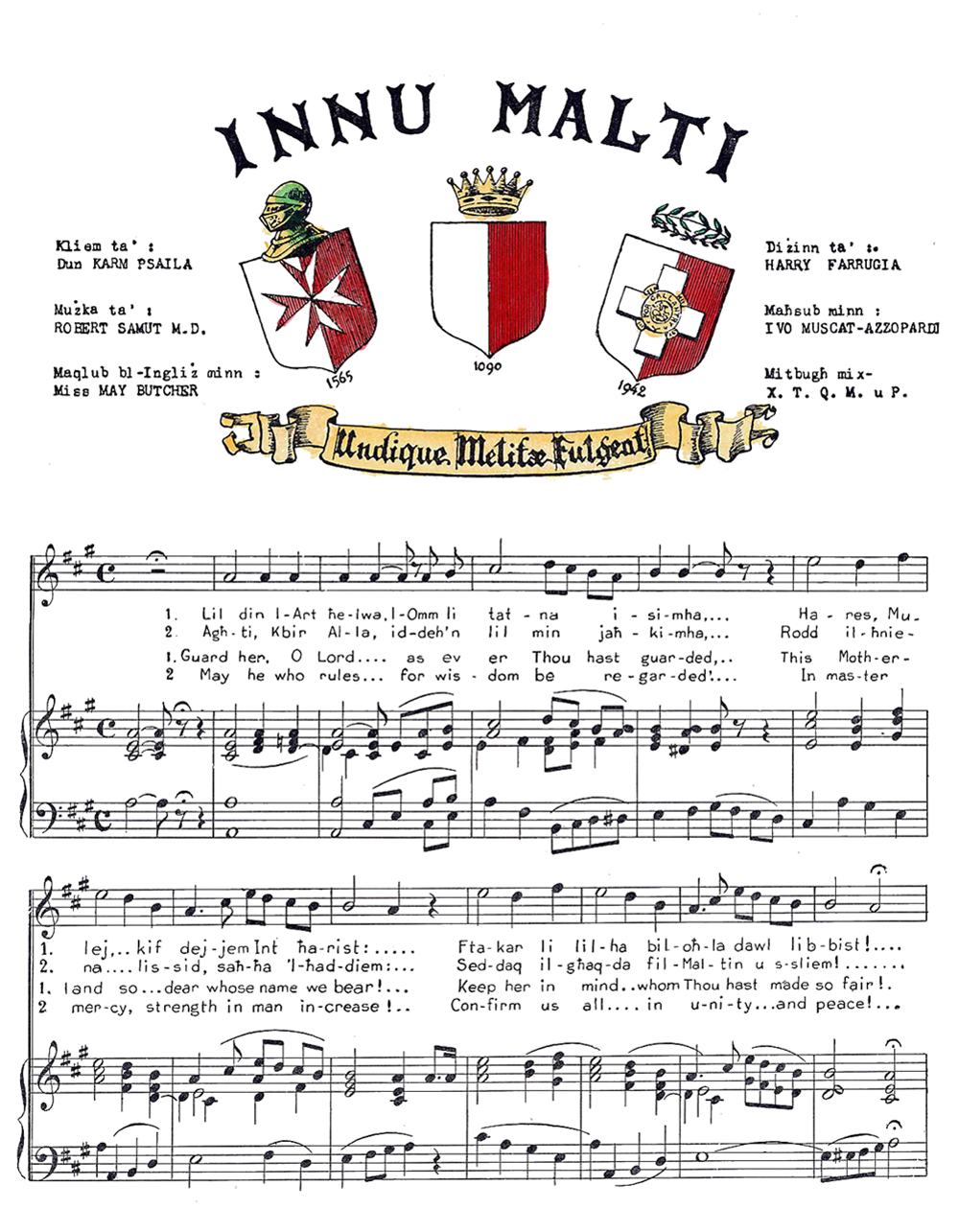 partition de 1942 du chant qui allait devenir en 1964 l'hymne maltais